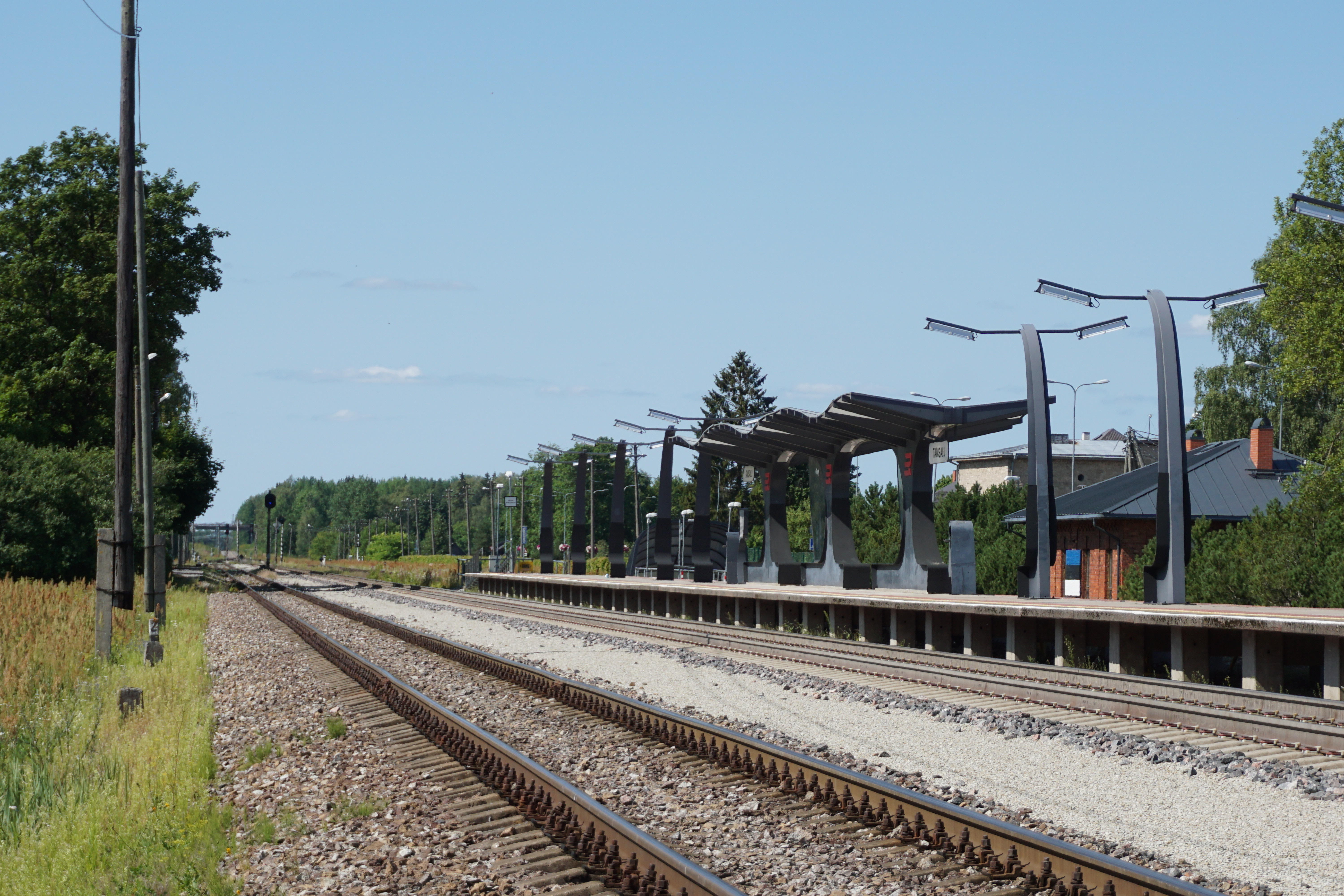 Tamsalu raudteejaam